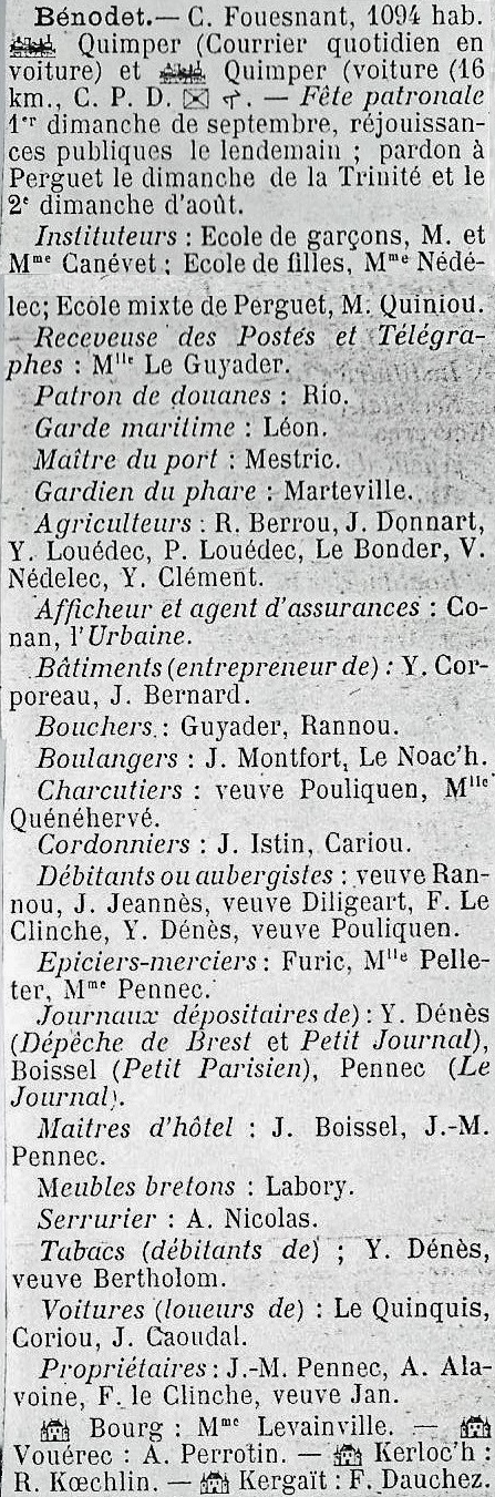 "Liste des principaux habitants des communes de l'arrondissement de Quimper : Bénodet (Annuaire du Finistère 1908)